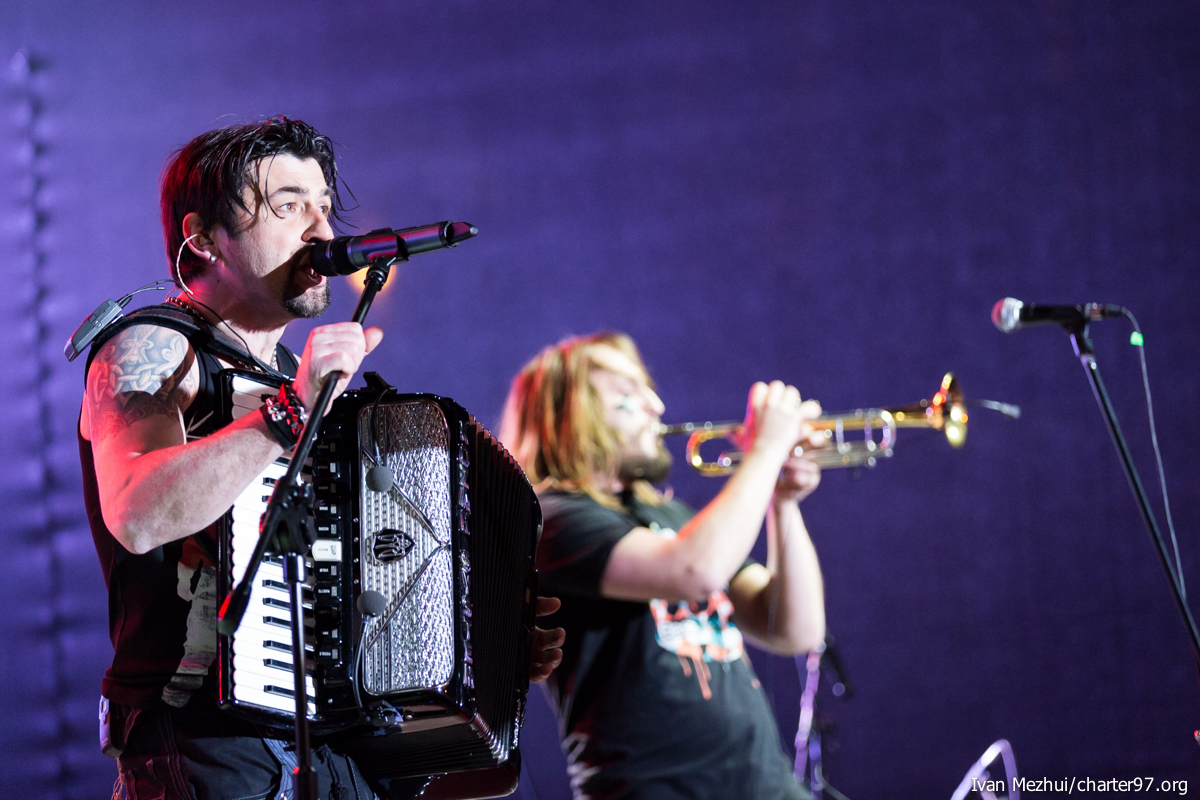 Koncert "Solidarni z Białorusią" 12 kwietnia 2014 roku na ul. gen. Tokarzewskiego-Karaszewicza w Warszawie.